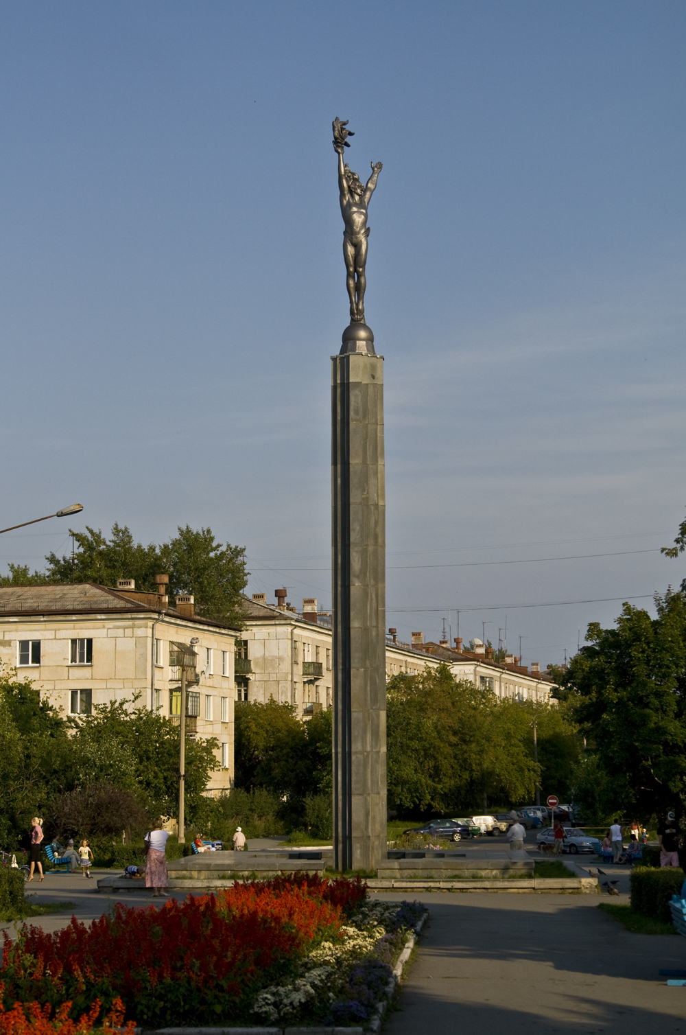 Монумент первопроходцам. Озерск. Челябинская область. Россия